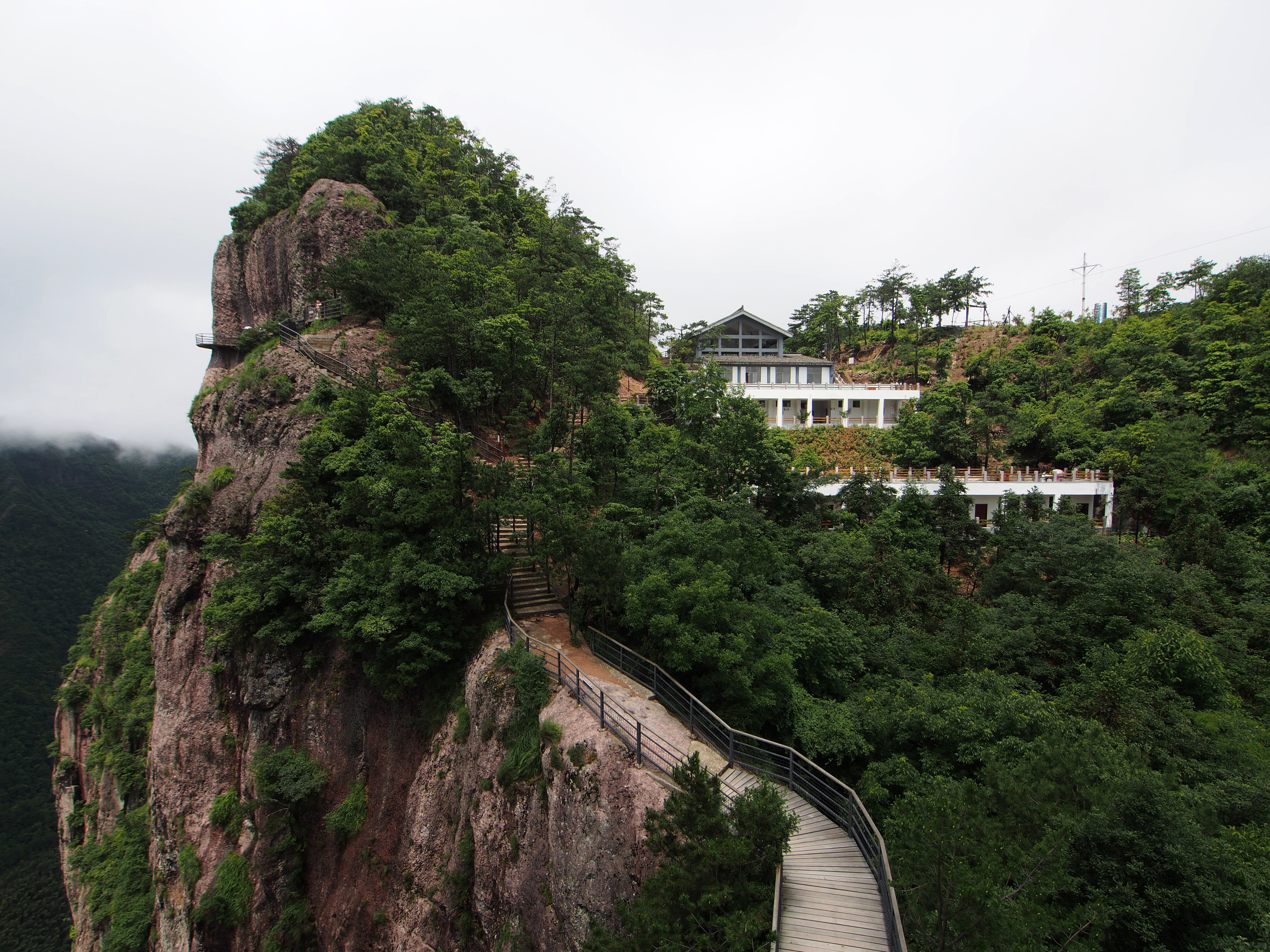 神仙居景区 - Shenxianju Scenic Area - 2014.05